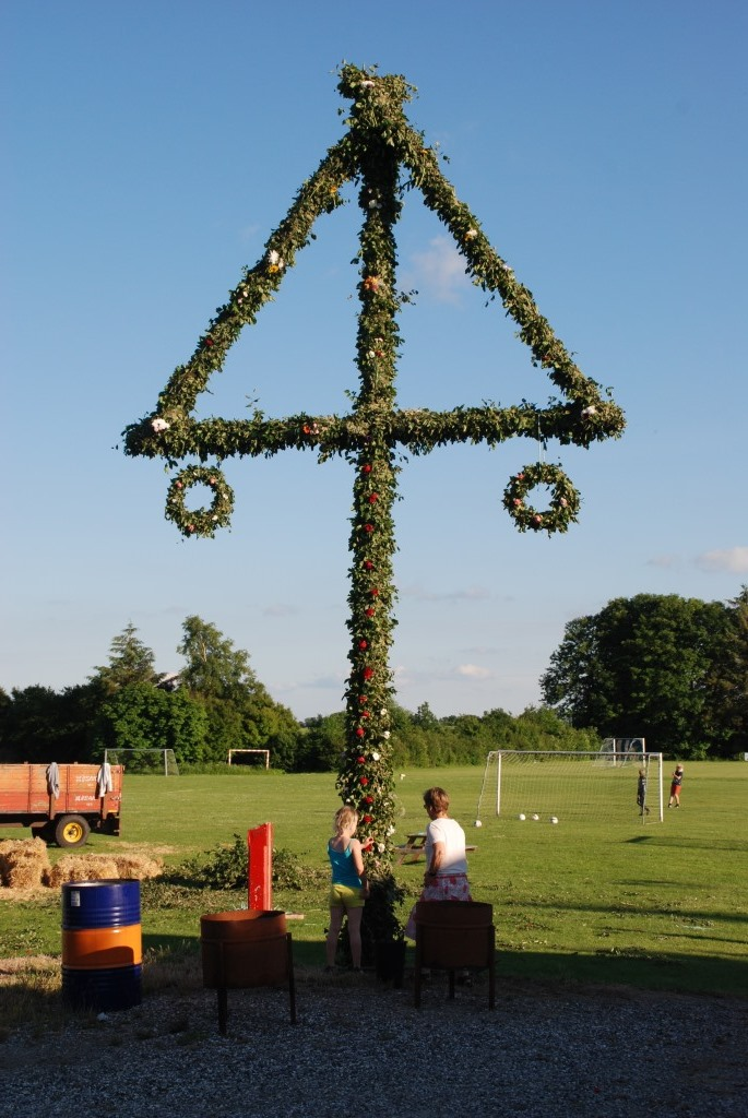 Majbøg (majstang) pinselørdag i Veddum 2014